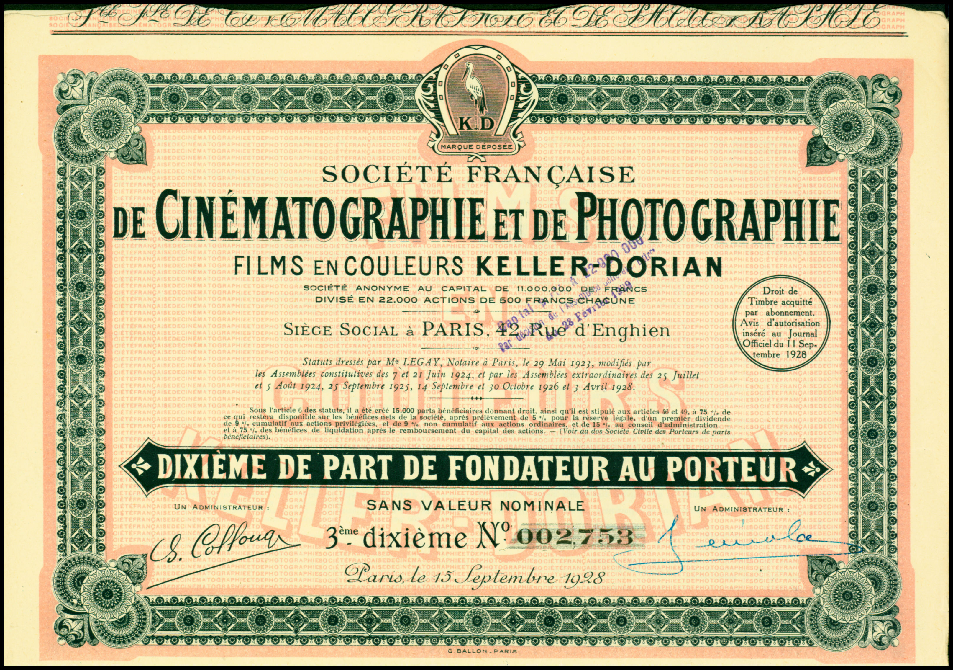 share certificate of the Société Française de Cinématographie et de Photographie, issued 15. September 1928